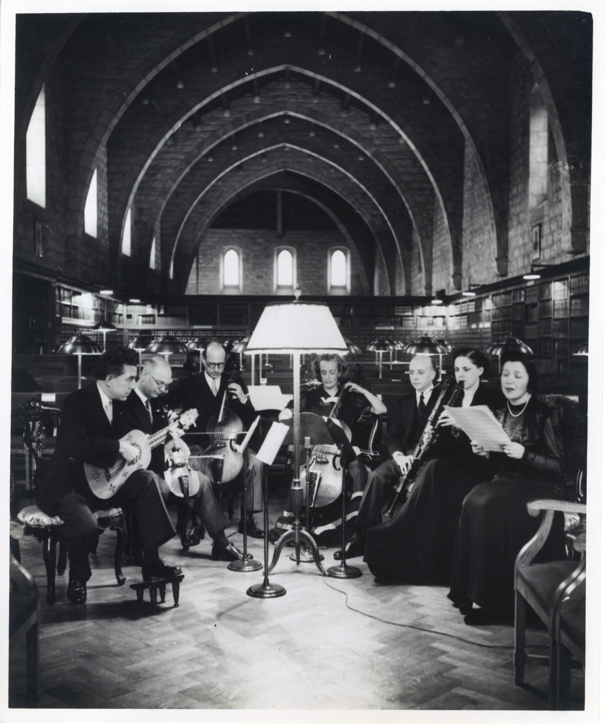 Concert del conjunt Ars Musicae a la Biblioteca de Catalunya l'any 1941